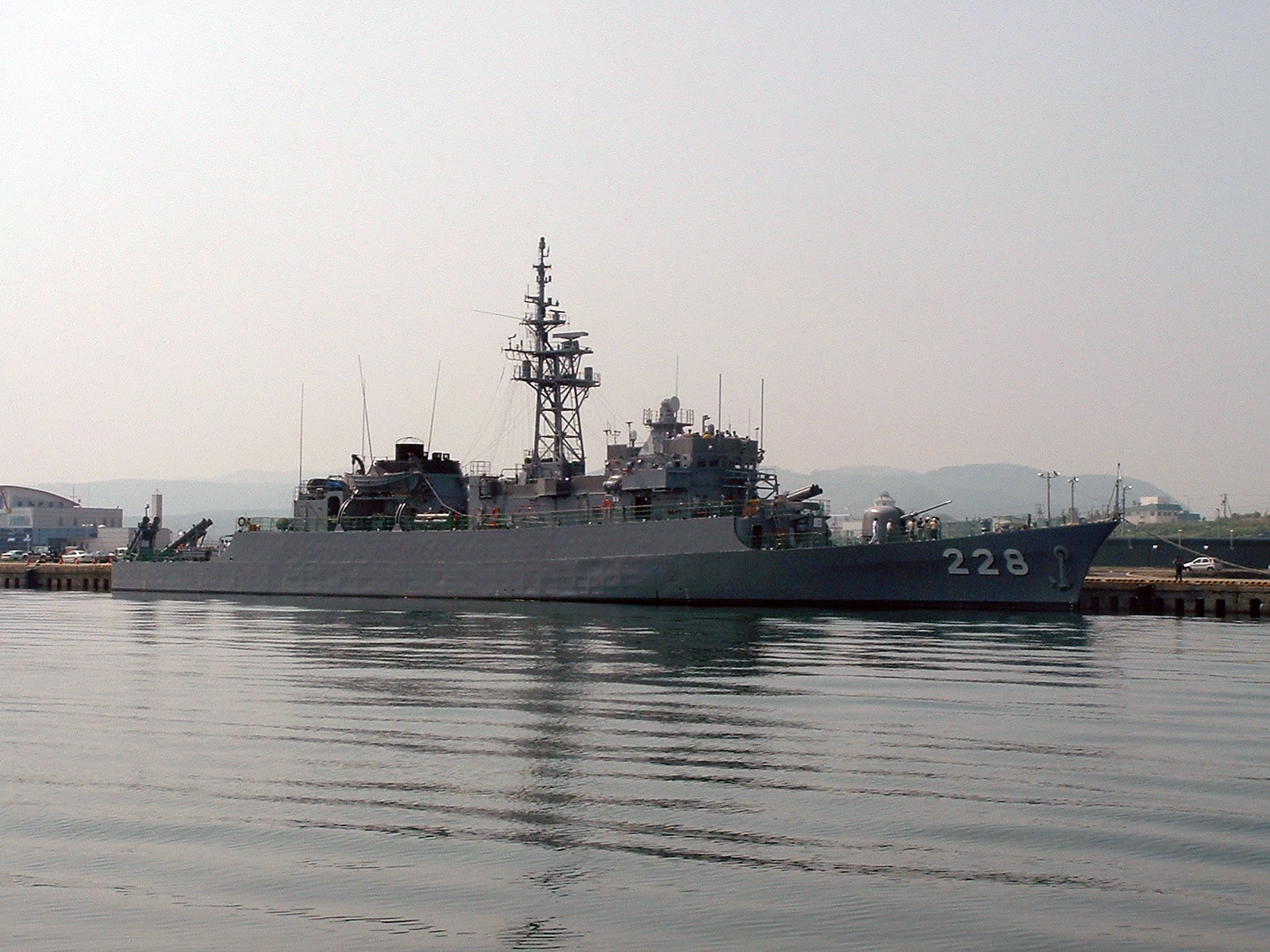 護衛艦ゆうべつ